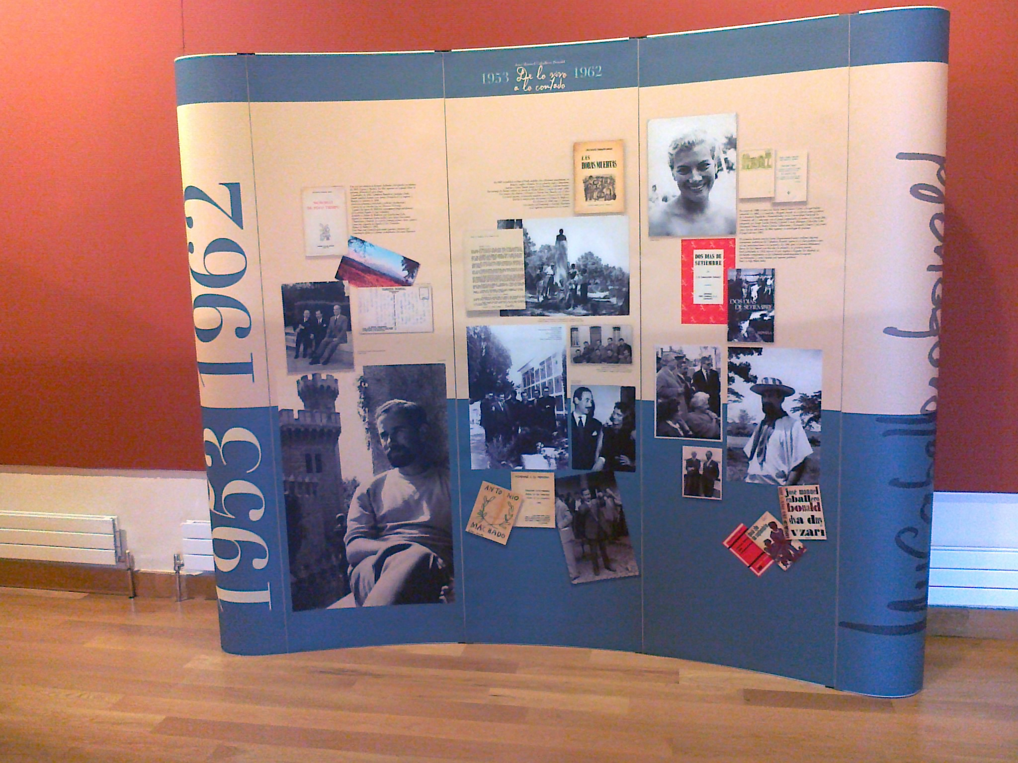 Exposición de José Manuel Caballero Bonald con motivo de su Premio Cervantes. Rectorado de la Universidad de Alcalá de Henares (Madrid, España)